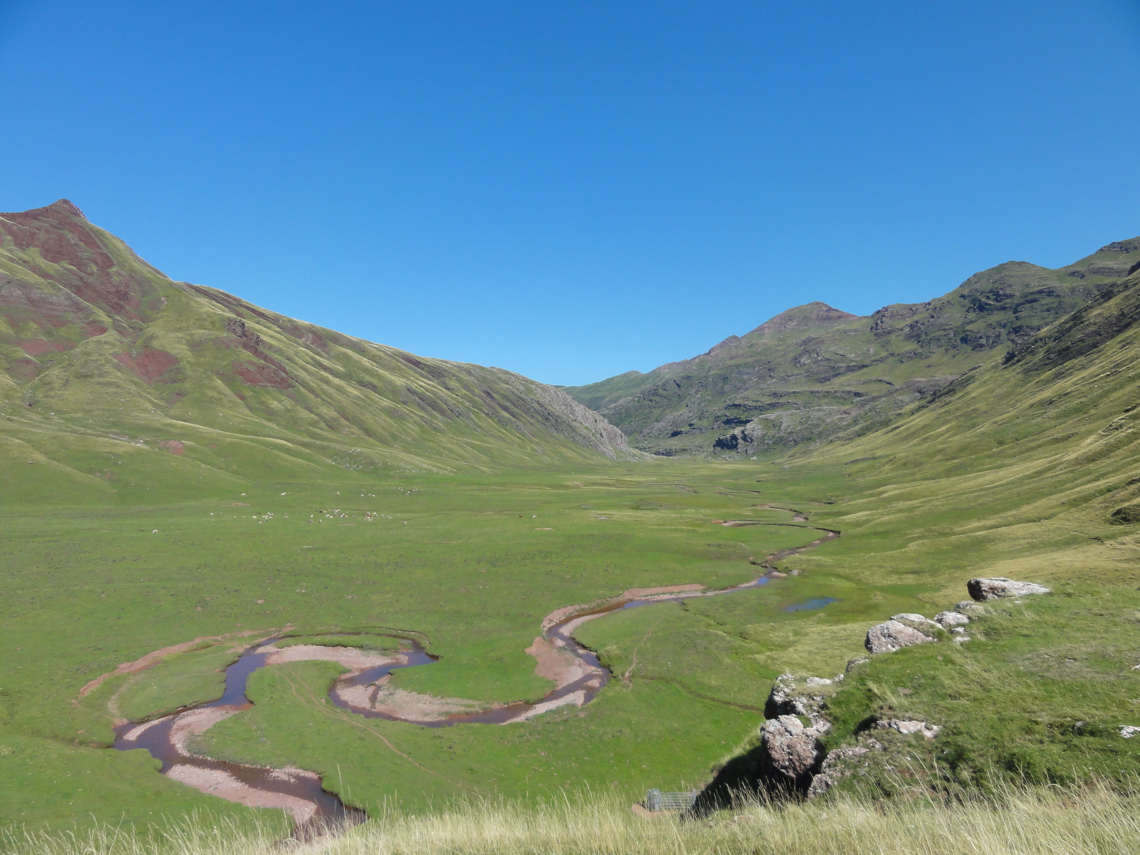 Parque natural de los Valles Occidentales This is a photography of a Special Area of Conservation in Spain with the ID: ES2410003. Natura2000 entry, EEA entry